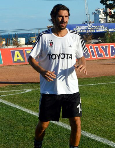 Escude 8 Eylül ( 8.09.2013 ) 'te oynanan dostluk maçında ilimiz takımlarından fotoğrafçılığını yaptığım Tekirdağspor maçında ısınırken